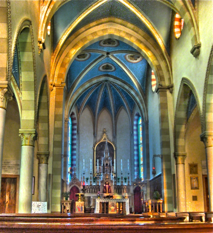 Interno della Chiesa di S. Michele Arcangelo, Brendola (VI)